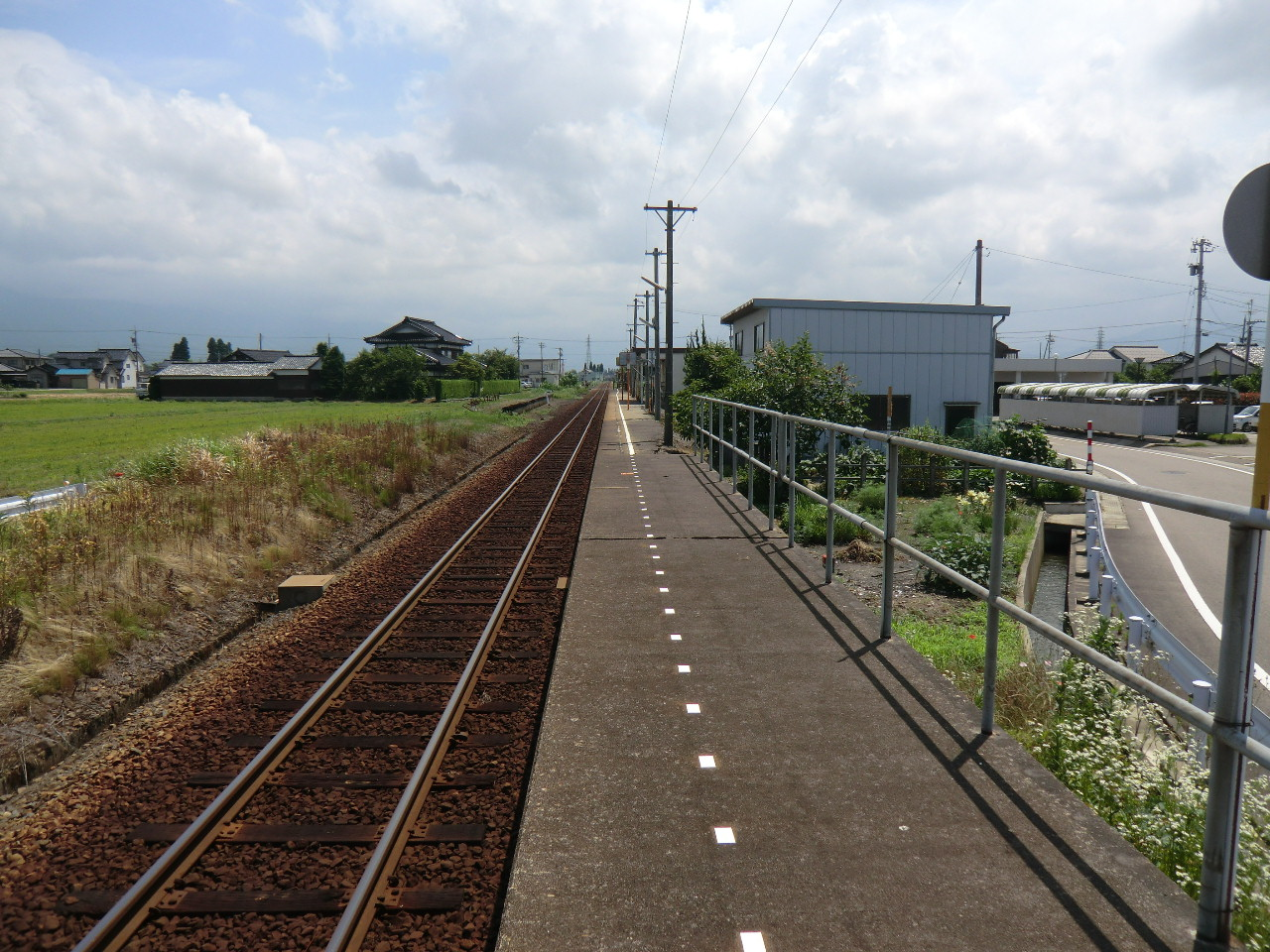 高儀駅 ホーム北端より